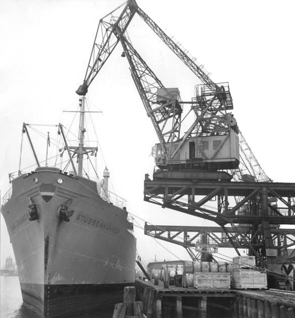 Factual corrections and alternative descriptions are encouraged separately from the original description. Additionally errors can be reported at this page to inform the Bundesarchiv. Original historic description: Rostock, Überseehafen, Stückgut wird gelöscht Zentralbild Mellahn 11.2.1959 DDR-Handelsflotte wird auf 110 Schiffe anwachsen Die Handelsflotte der Deutschen Demokratischen Republik wird bis Ende 1965 über 110 Schiffe verfügen. Gegenwärtig befahren 32 Schiffe unter der schwarz-rot-goldenen Flagge der DDR die Nord- und Ostsee, das Mittelmeer und den Indischen Ozean. Allein im vergangenen Jahr stellte die Deutsche Seereederei fünf 10000-Tonnen-Frachter und zwei 4000-Schiffe in Dienst. UBz: Zu den im Vorjahr in Dienst gestellten Schiffen gehört der 4000-Tonnen-Frachter "Stubbenkammer". Die Ladung wird nach erfolgreicher Fahrt der "Stubbenkammer" in die Häfen der VAR im Rostocker Hafen gelöscht.